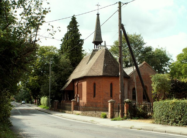 St. James' church, Sewards End, Essex